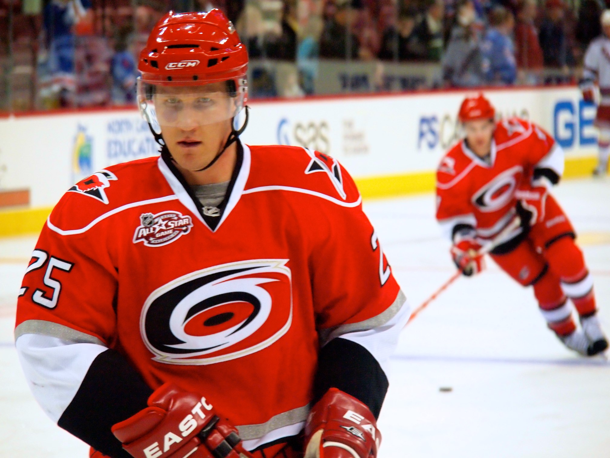 Joni Pitkanen